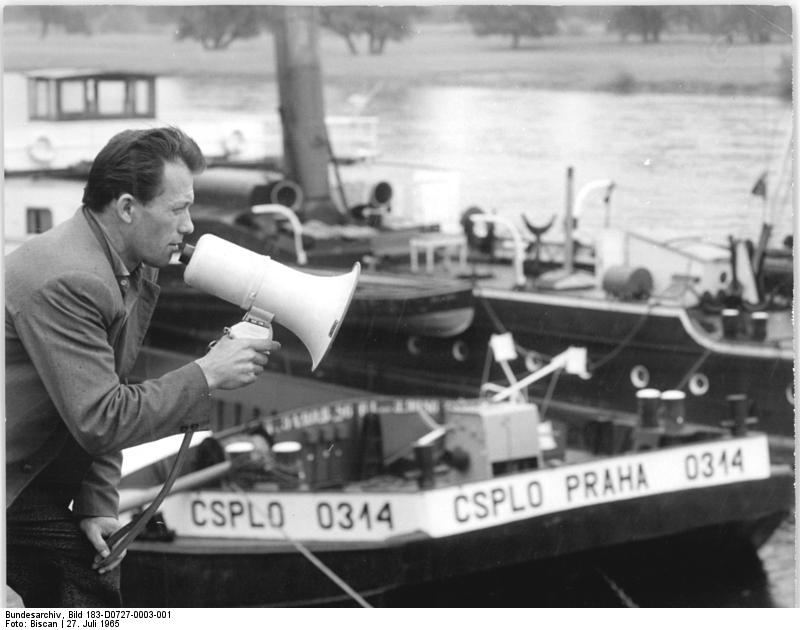 Magdeburg, Lastkähne Zentralbild Biscan 27.7.1965 Magdeburg-Zwischenstation für CSSR-Schiffer Gute Weiterfahrt wünscht hier Dispatcher Oldrich Sedlacek mit dem elektronischen Megaphon. Die Tschechoslowakische Elbe-Oder-Schiffahrtsgesellschaft (CSPLO) unterhält im Magdeburger Hafen eine Station, die jeden Tag von etlichen Motorschiffen und Schleppzügen angelaufen wird. Magdeburg ist Endstation für viele Transporte CSSR-DDR und Zwischenstation für alle Transporte zwischen der CSSR und Hamburg.